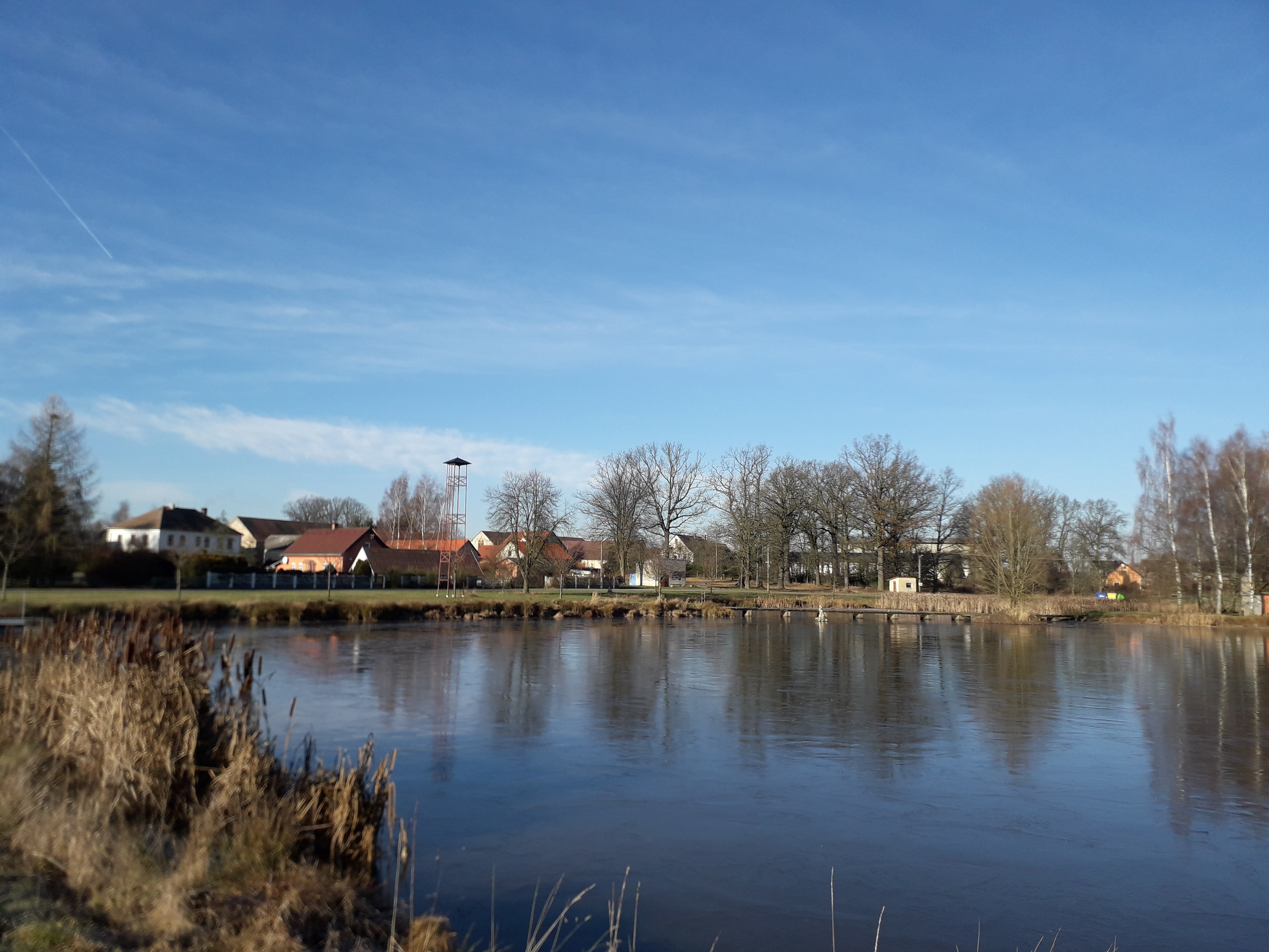 část obce Křižovatka v okrese Cheb, návesní rybník